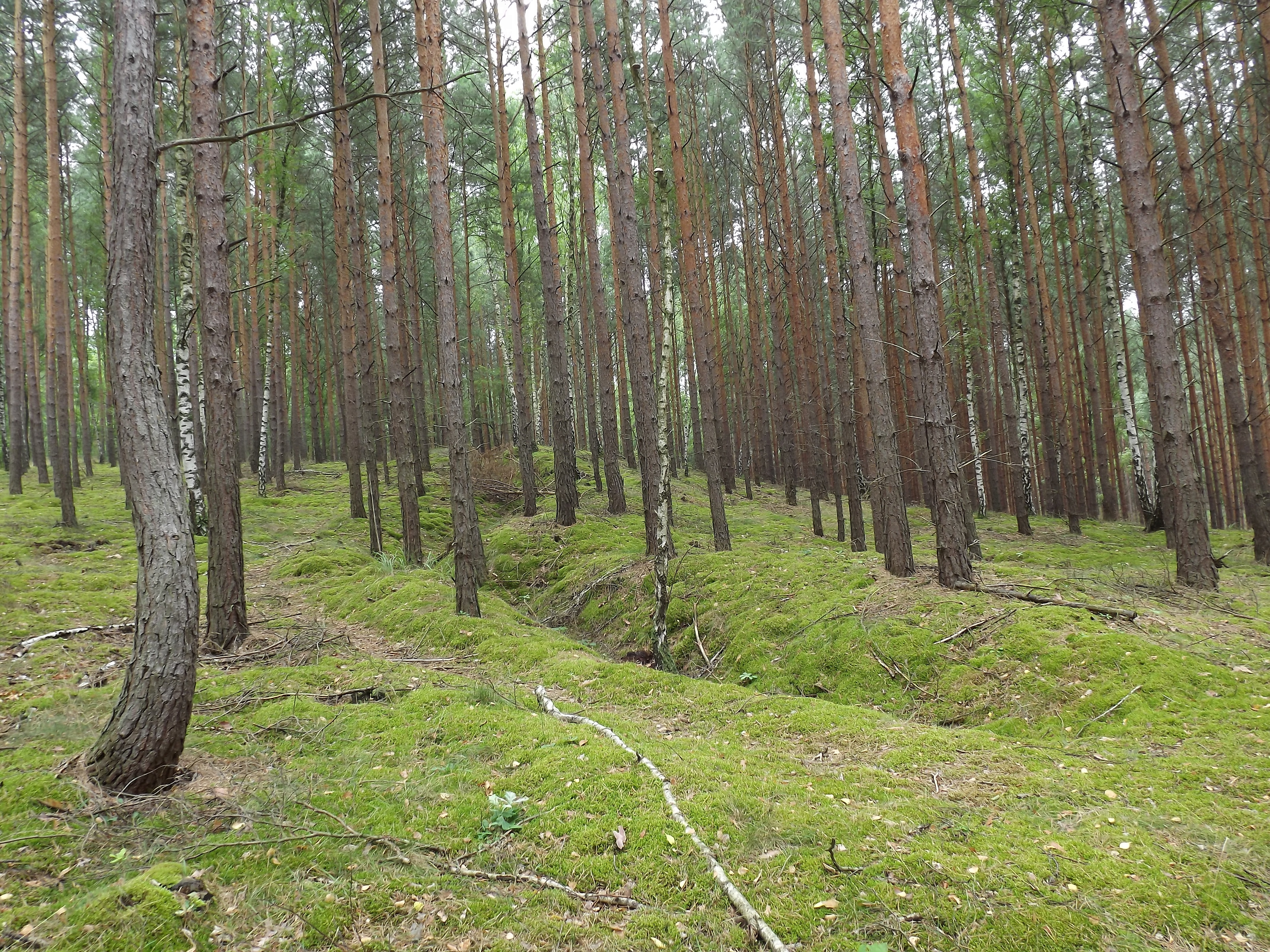 Pozycja Trzcielska - pozostałości po okopach w okolicach Borowego Młynu